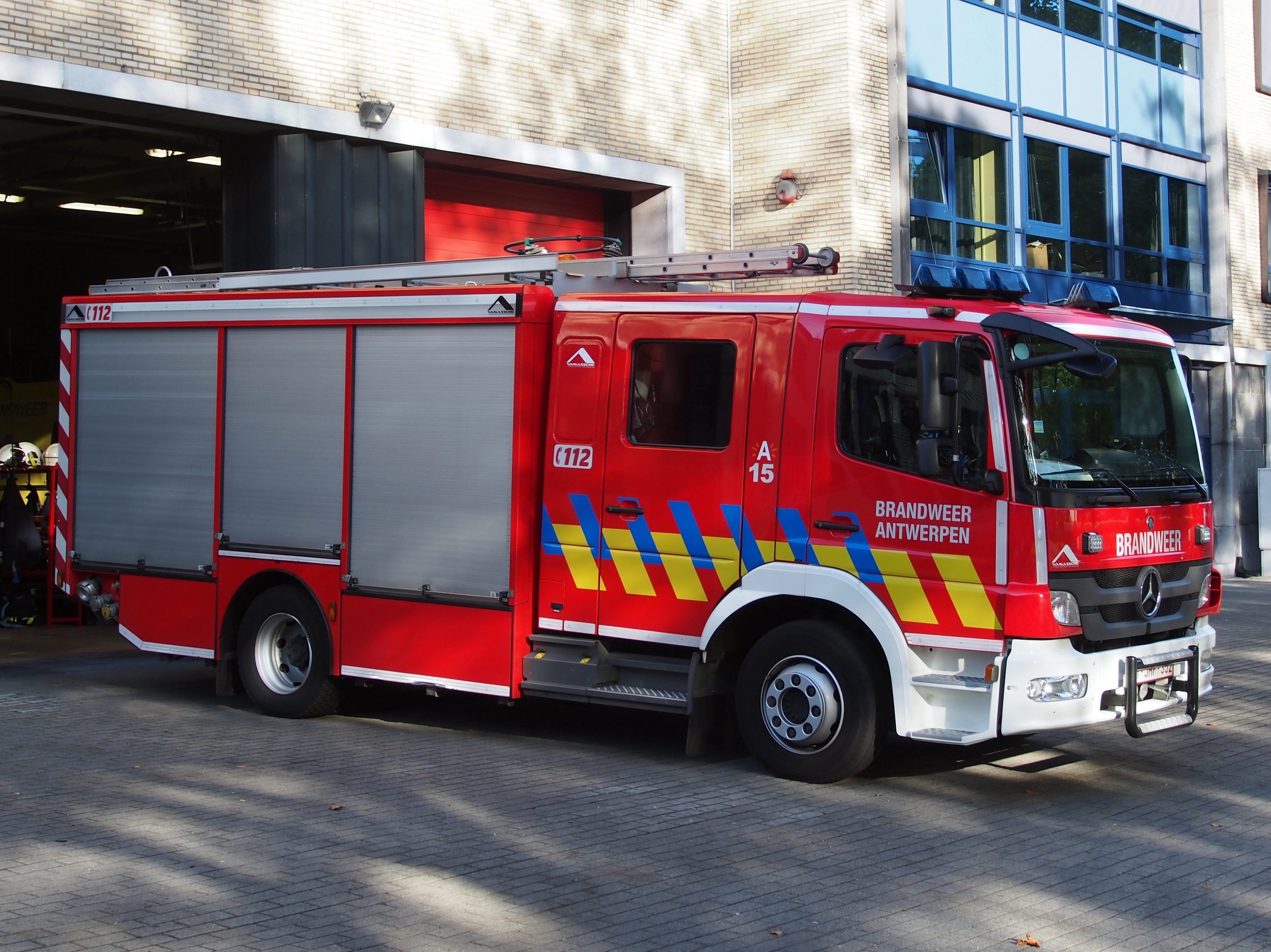 Brandweerwagen gefotografeerd in Antwerpen.